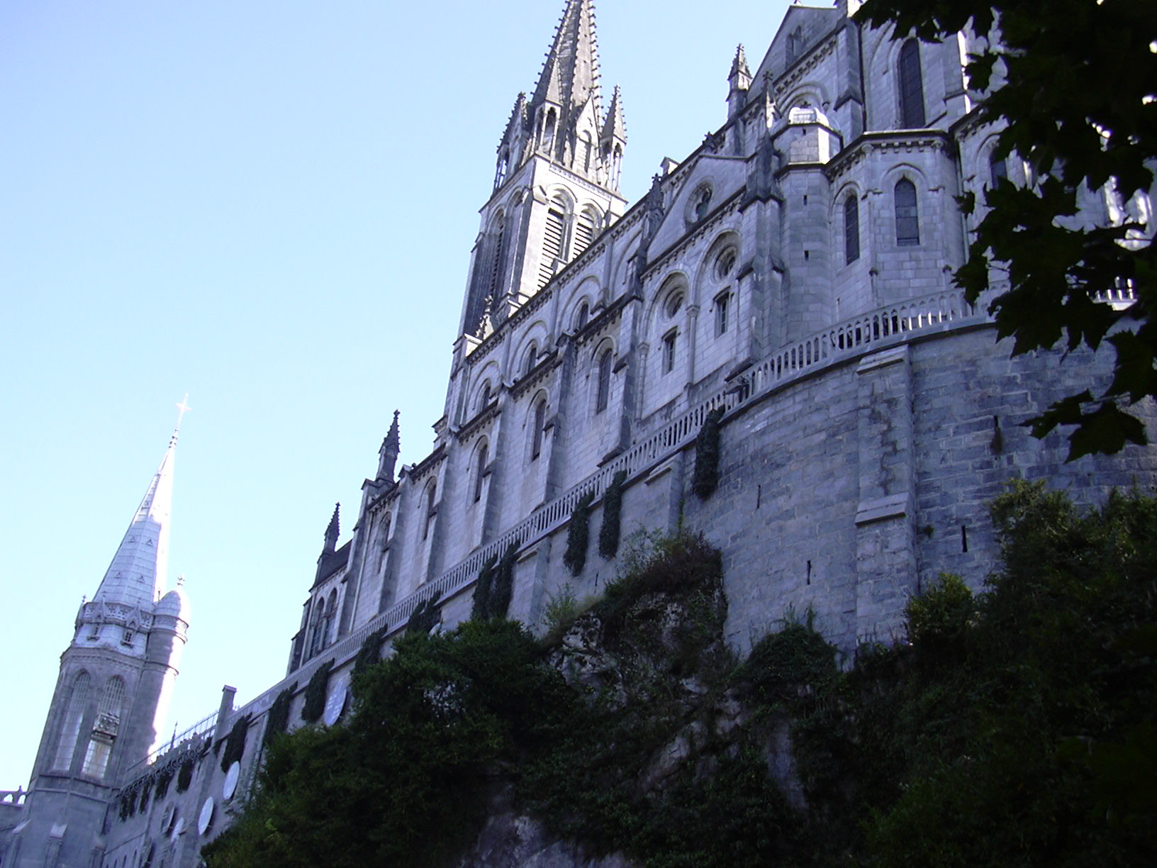 Catedral de Lourdes, Altos Pirineos, Francia.